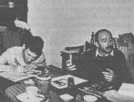 Skay y el Indio Solari en una foto de los comienzos del grupo en la década de 1970.